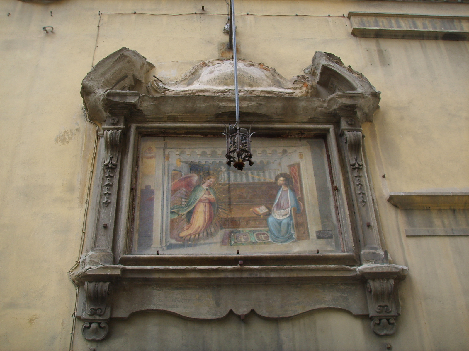 Piazza del capitolo, annunciazione